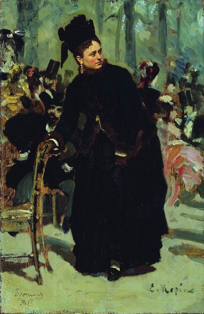 Esquisse pour Un café parisien